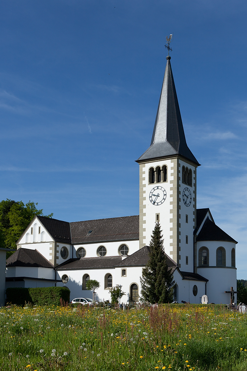 Pfarrkirche St. Antonius in St. Antoni (FR)